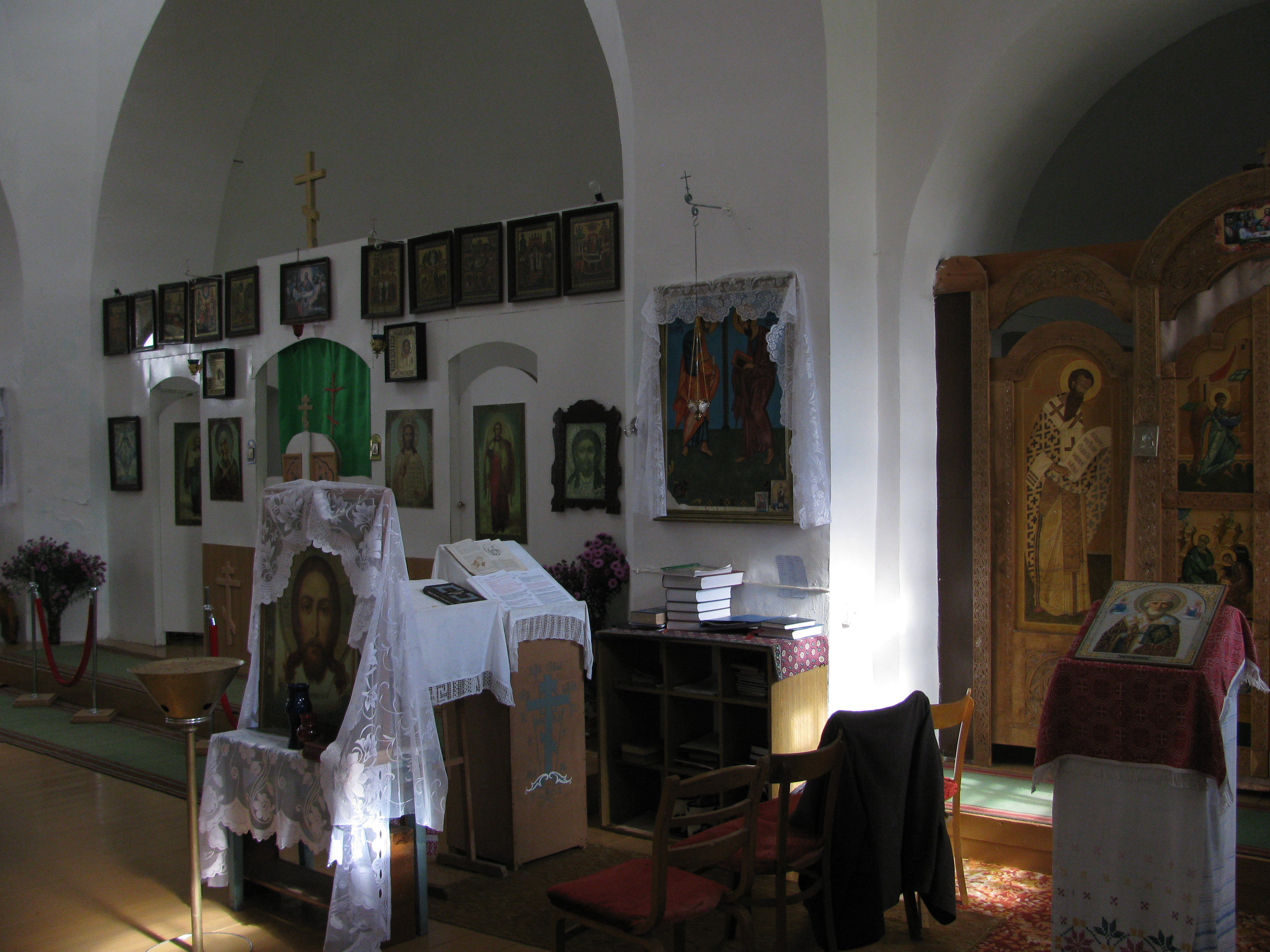 Беларуская (тарашкевіца): Сьвята-Петрапаўлаўская царква. в. Бразьдзечына This is a photo of Belarusian heritage monument. Reference number: 213Г000128 ( WLM)